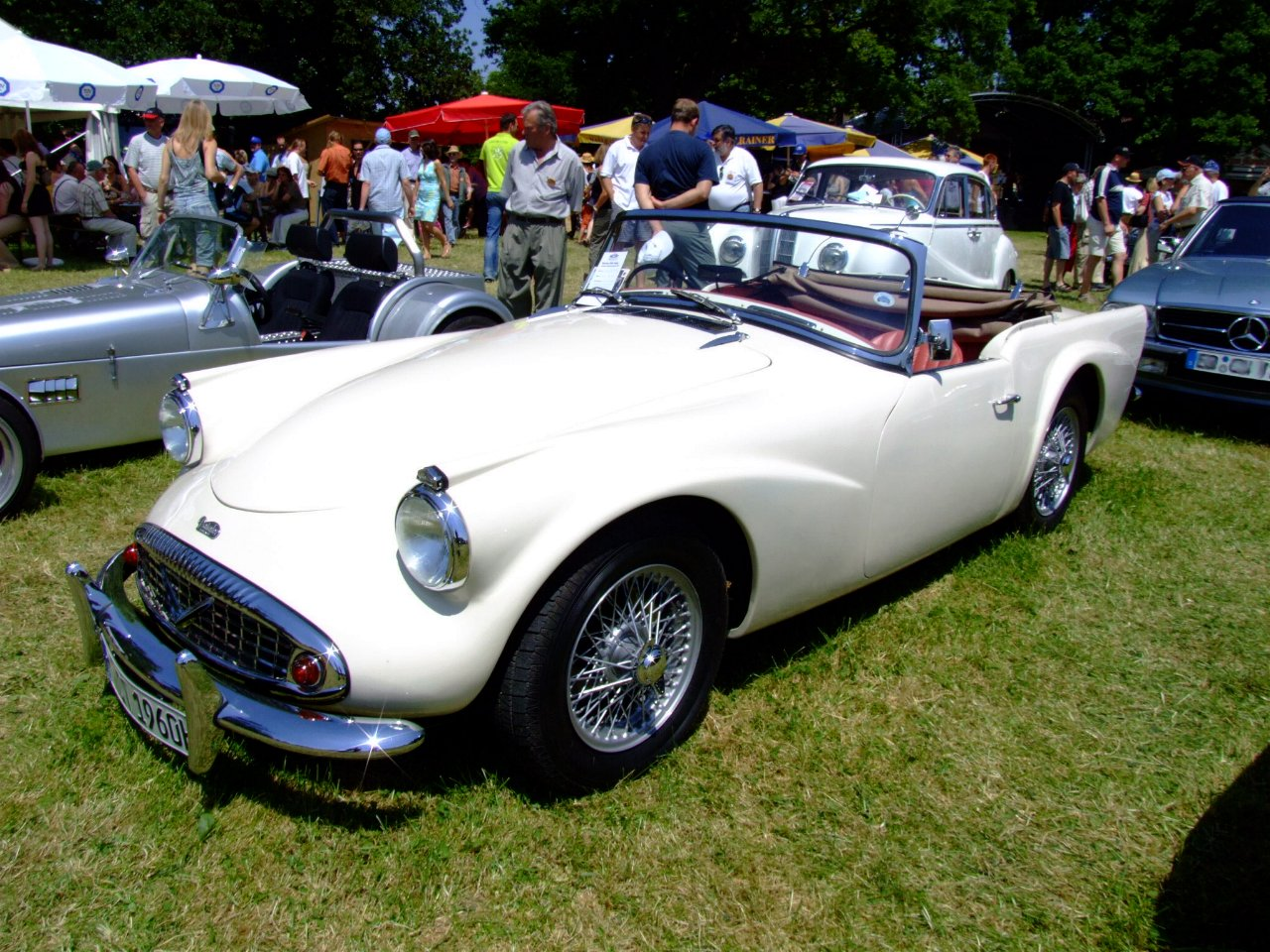 Summary Daimler SP250 Baujahr: 1960 PS: 140 Zylinder: 8 Hubraum: 2,5 Ltr.